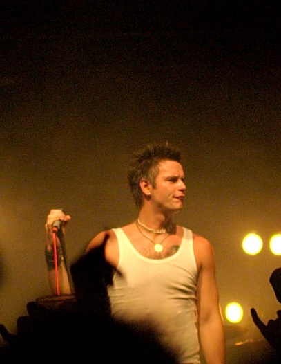 Janove Ottesen, singer in Kaizers Orchestra